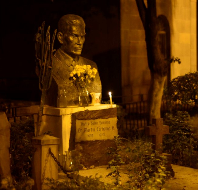 Lápida del cementerio